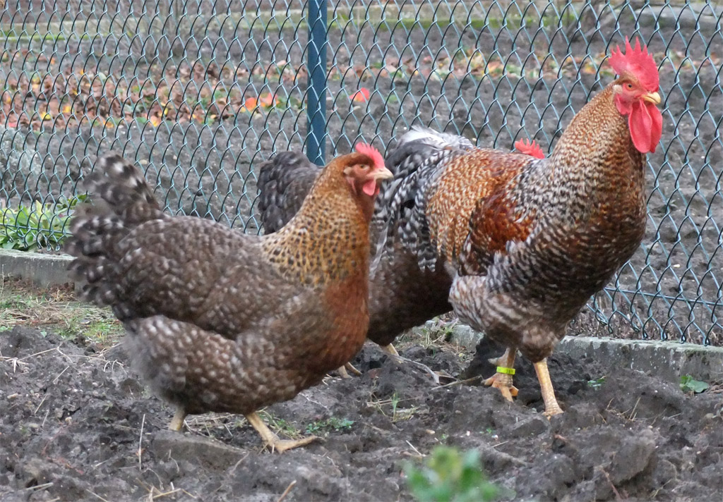 Bielefelder Kennhuhn